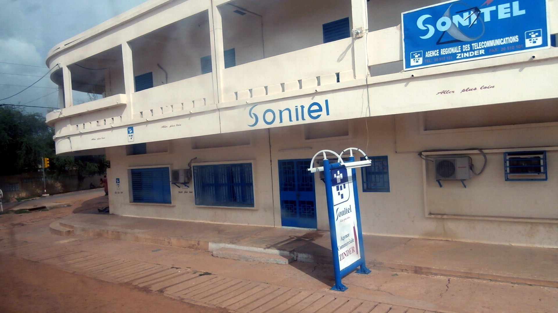 La sonibank section de Zinder